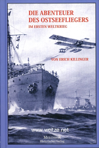 Coverbild "Die Abenteuer des Ostseefliegers"